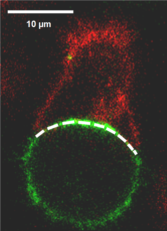 Figura 1. La respuesta de propagación y expansión de células NK. (A) Un corte óptico ilustrativo a través de un conjugado entre una célula NK y una célula objetivo tipo 221. Arriba una célula NK en rojo. Abajo una célula objetivo tipo 221 en verde. La línea de puntos ilustra la sinapsis inmunitaria y la longitud del contacto medido en. Inmunohistoquímica: célula NK etiquetada para DiO en rojo. Un transfectante de célula 221 marcada para MICA-YFP en verde. Microscopio confocal. Barra de escala= 10 μm.